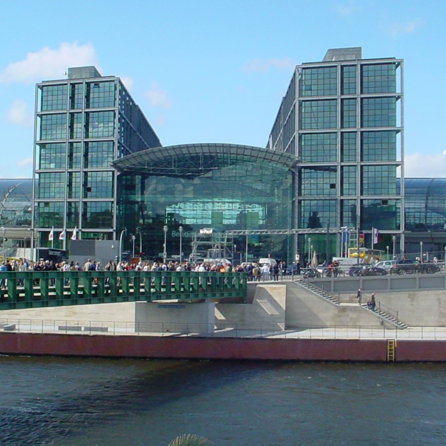 Südeingang des Berliner Hauptbahnhofes